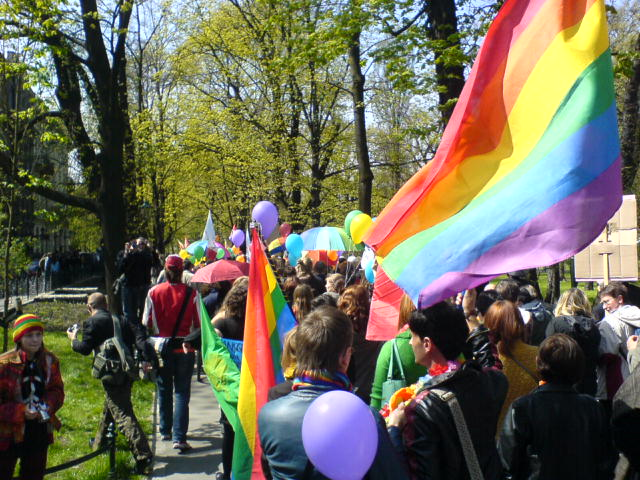 Poland, Kraków, Planty, Marsz Tolerancji 2007, 21.04.2007